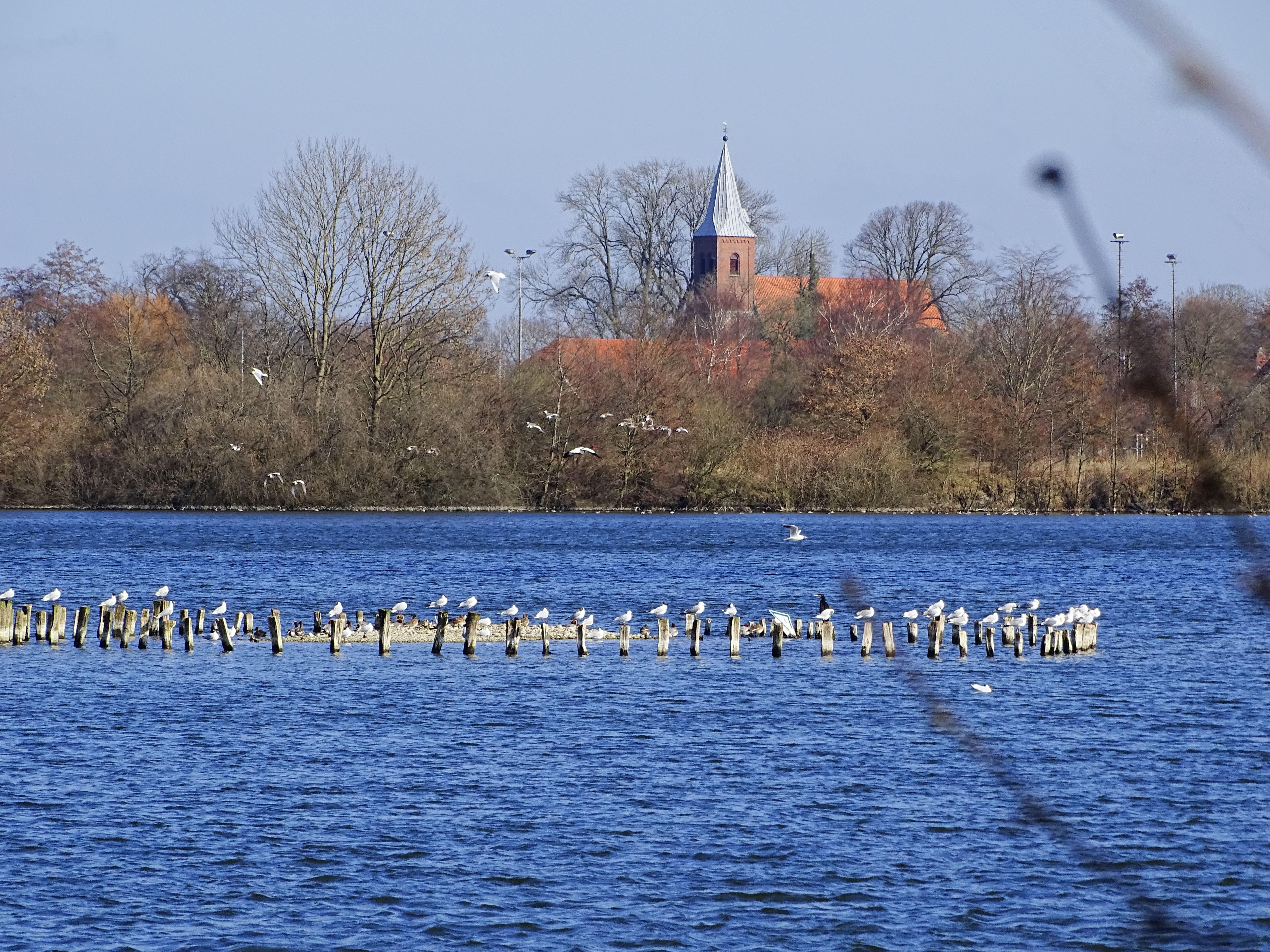 Blick über den Barghauser See im Landschaftsschutzgebiet „Barghauser See“ im Wilhelmshavener Stadtteil Fedderwarden, im Hintergrund die St.-Stephanus-Kirche